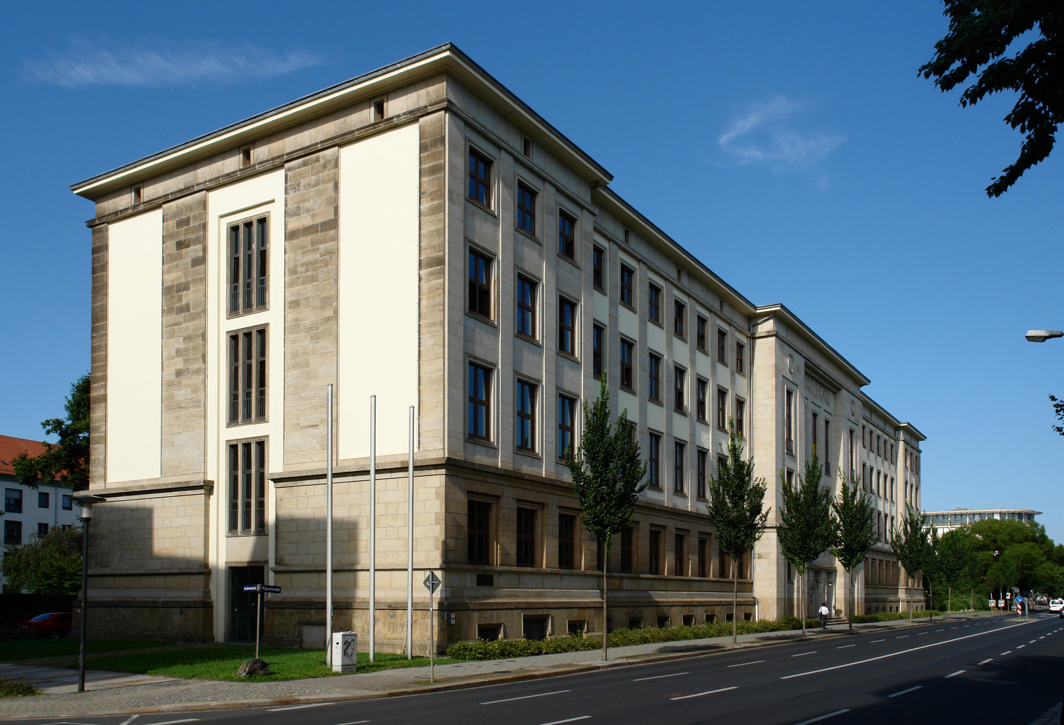 Dresden-Neustadt, Wigardstraße 17. Ehem. Gebäude der Pädagogischen Hochschule Dresden, heute Sitz des Sächsischen Staatsministeriums für Wissenschaft und Kunst.